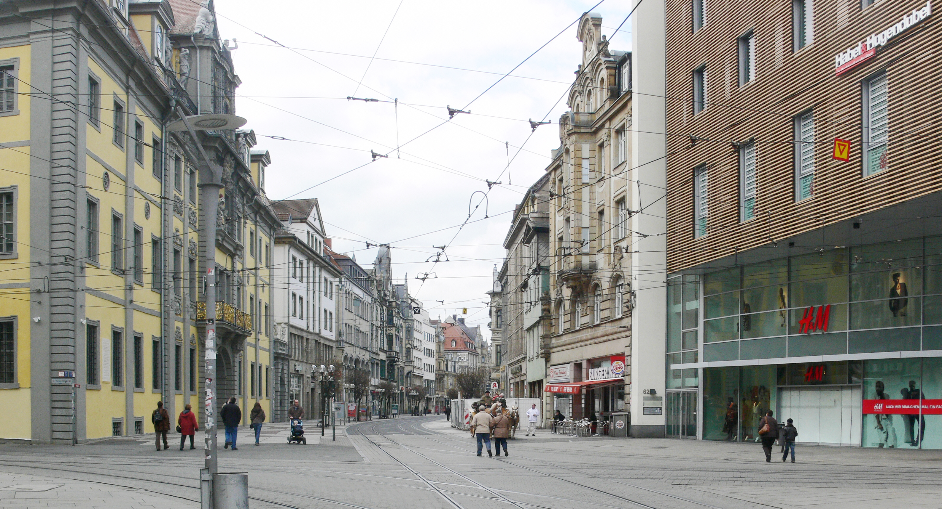 Anger, Blick Richtung Westen, links das Angermuseum, rechts das Angereck